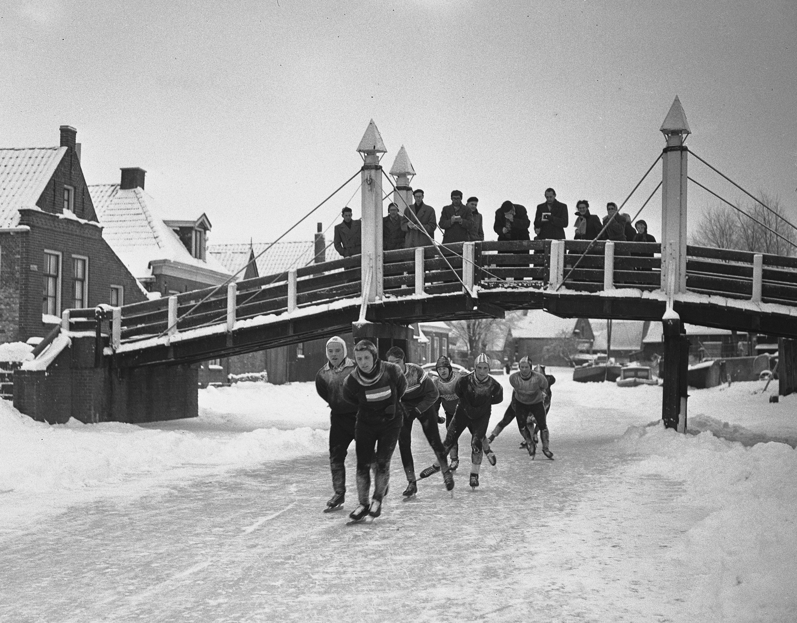 Collectie / Archief : Fotocollectie Anefo Reportage / Serie : [ onbekend ] Beschrijving : Elfstedentocht. Kopgroep in Hindeloopen Datum : 14 februari 1956 Locatie : Hindeloopen Trefwoorden : kopgroepen Instellingsnaam : Elfstedentocht Fotograaf : Bilsen, Joop van / Anefo Auteursrechthebbende : Nationaal Archief Materiaalsoort : Glasnegatief Nummer archiefinventaris : bekijk toegang 2.24.01.09 Bestanddeelnummer : 907-5935